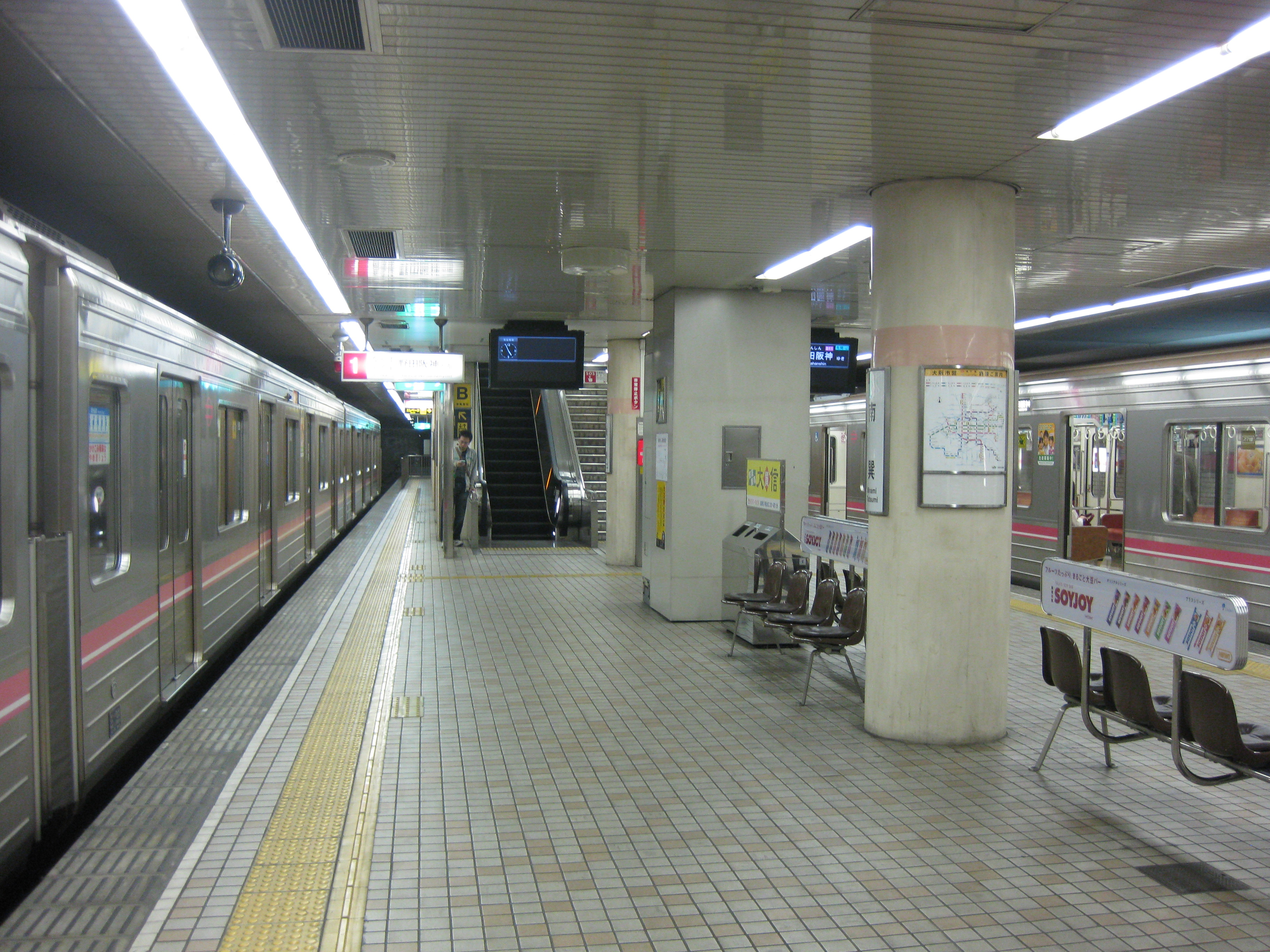 地下鉄千日前線南巽駅プラットホーム